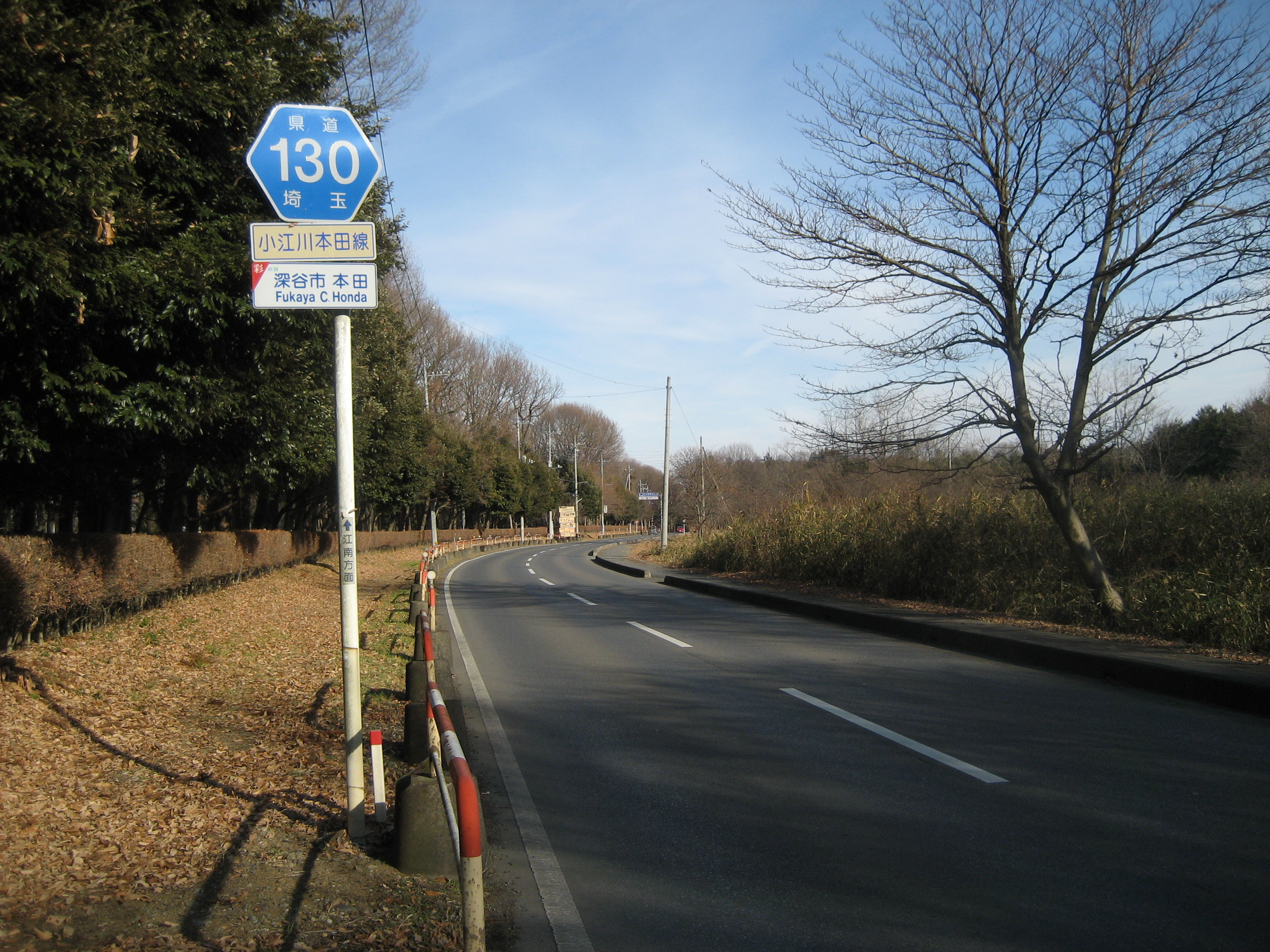 埼玉県道130号線深谷市 埼玉県農林公園付近